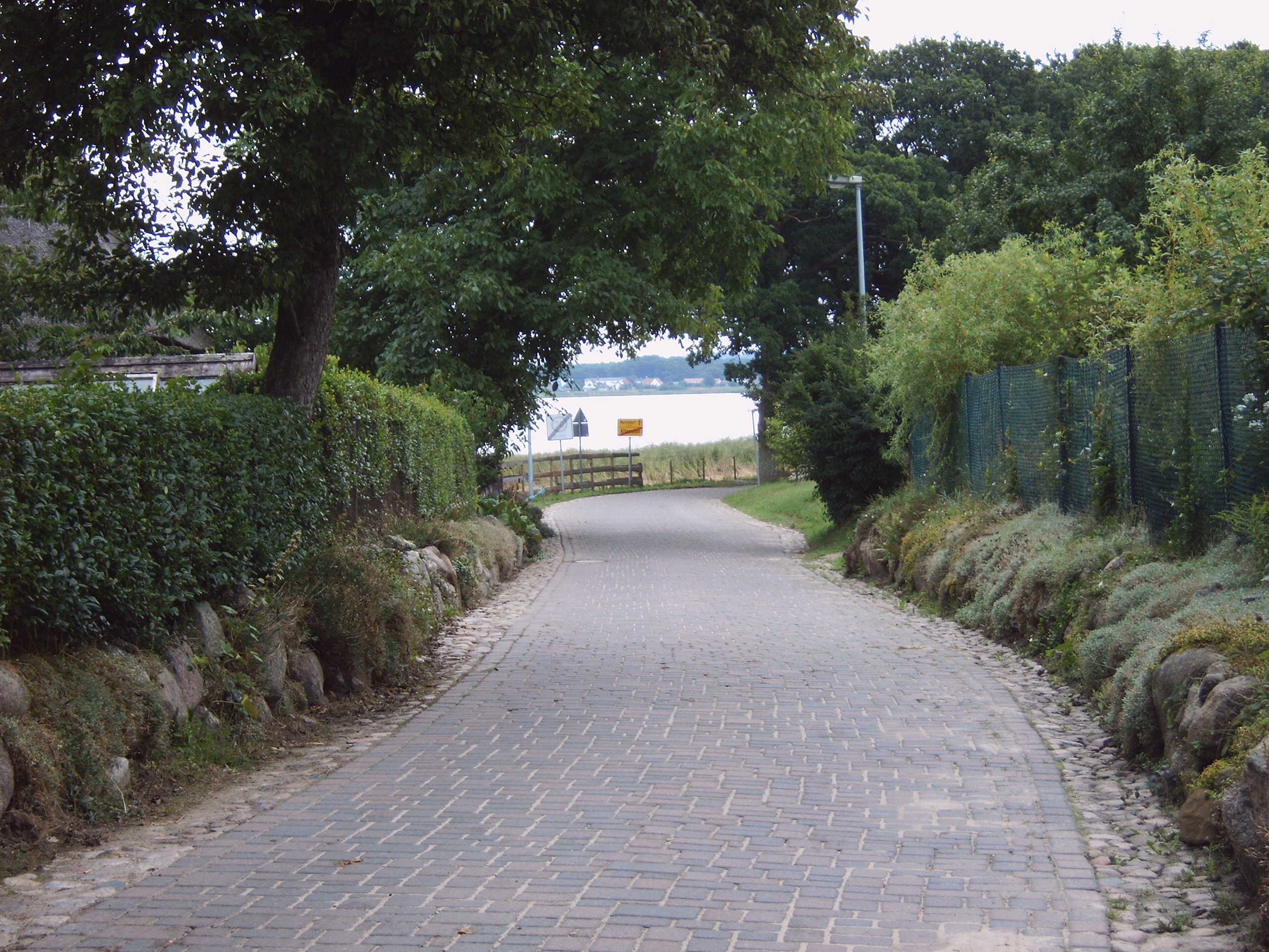 Altensien (Sellin) auf Rügen, Deutschland, Blick zum Selliner See Bild aufgenommen am 13.8.2006 durch Olaf Meister